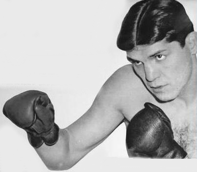 Il pugile italiano Carlo Orlandi